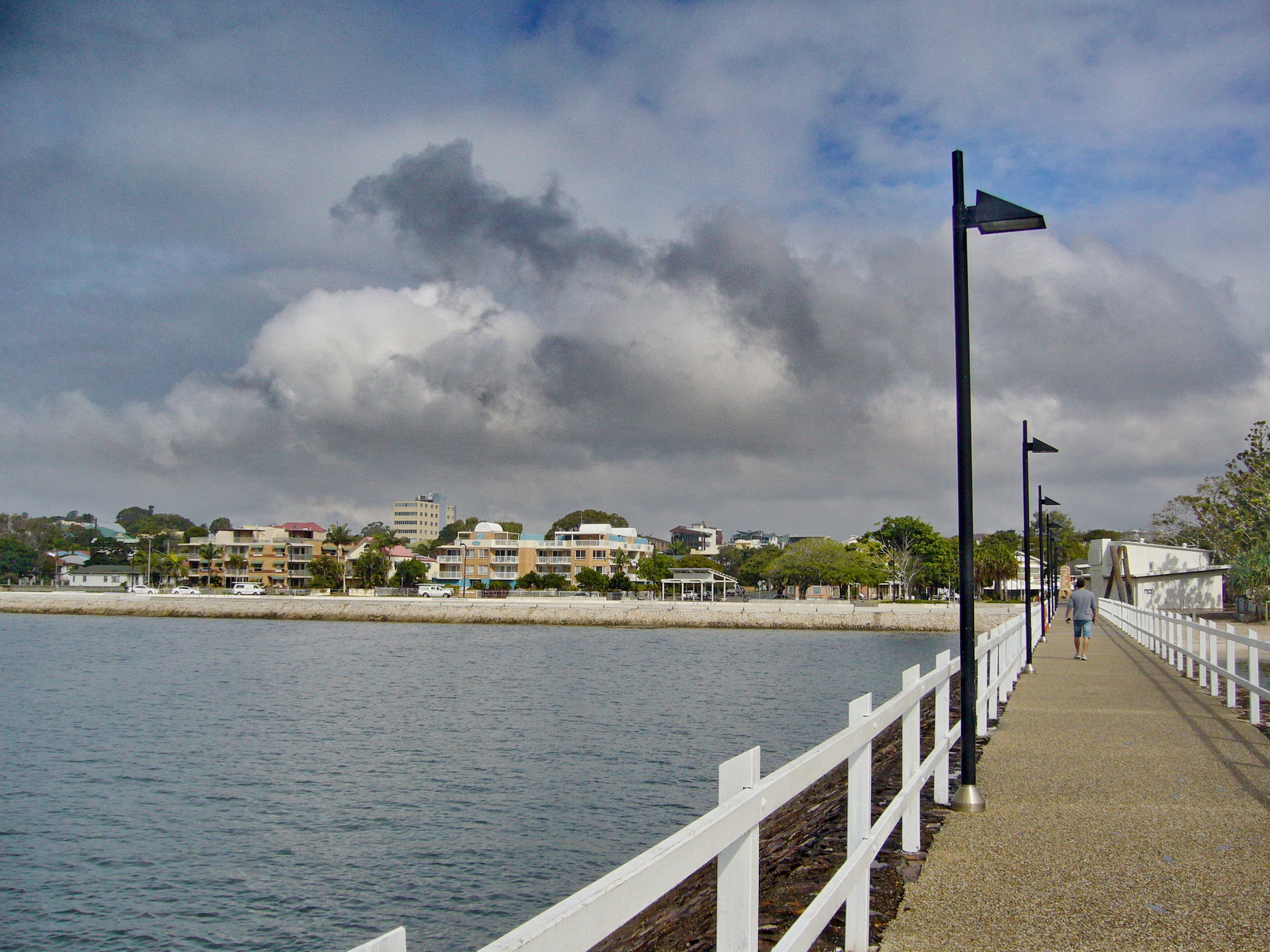 Wynnam